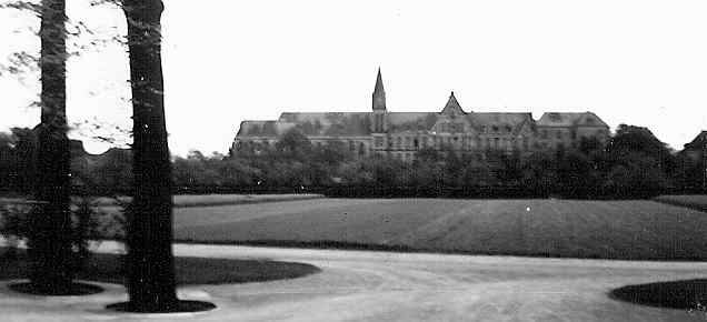 Angelaschule Osnabrück-Haste 1957